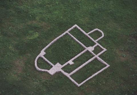 Gyöngyöspata, Hungary, aerialphotography